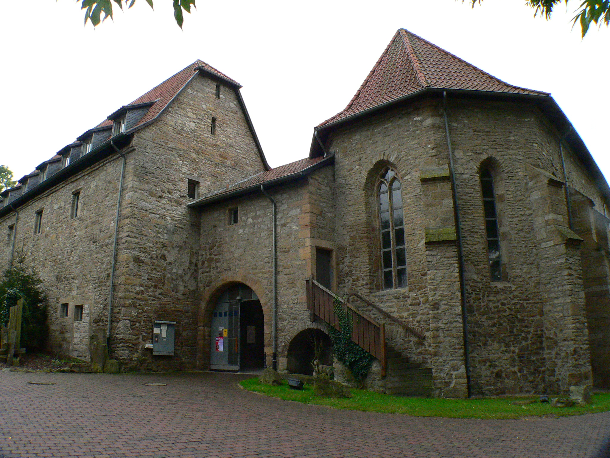 Kloster Cornberg, Hessen, Deutschland - Eingang